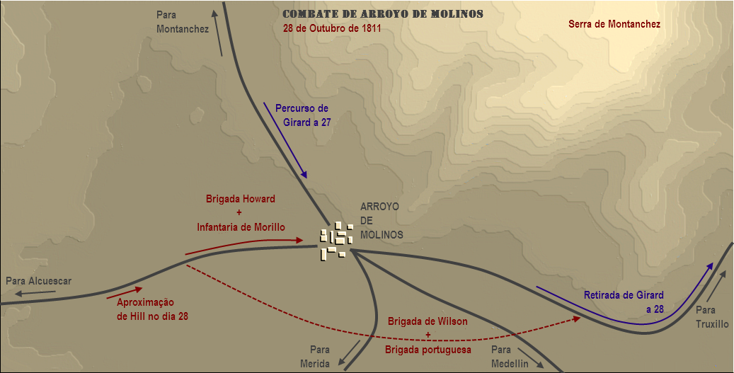 Mapa com esquema dos movimentos das tropas durante o combate em Arroyomolinos, 1811-10-28